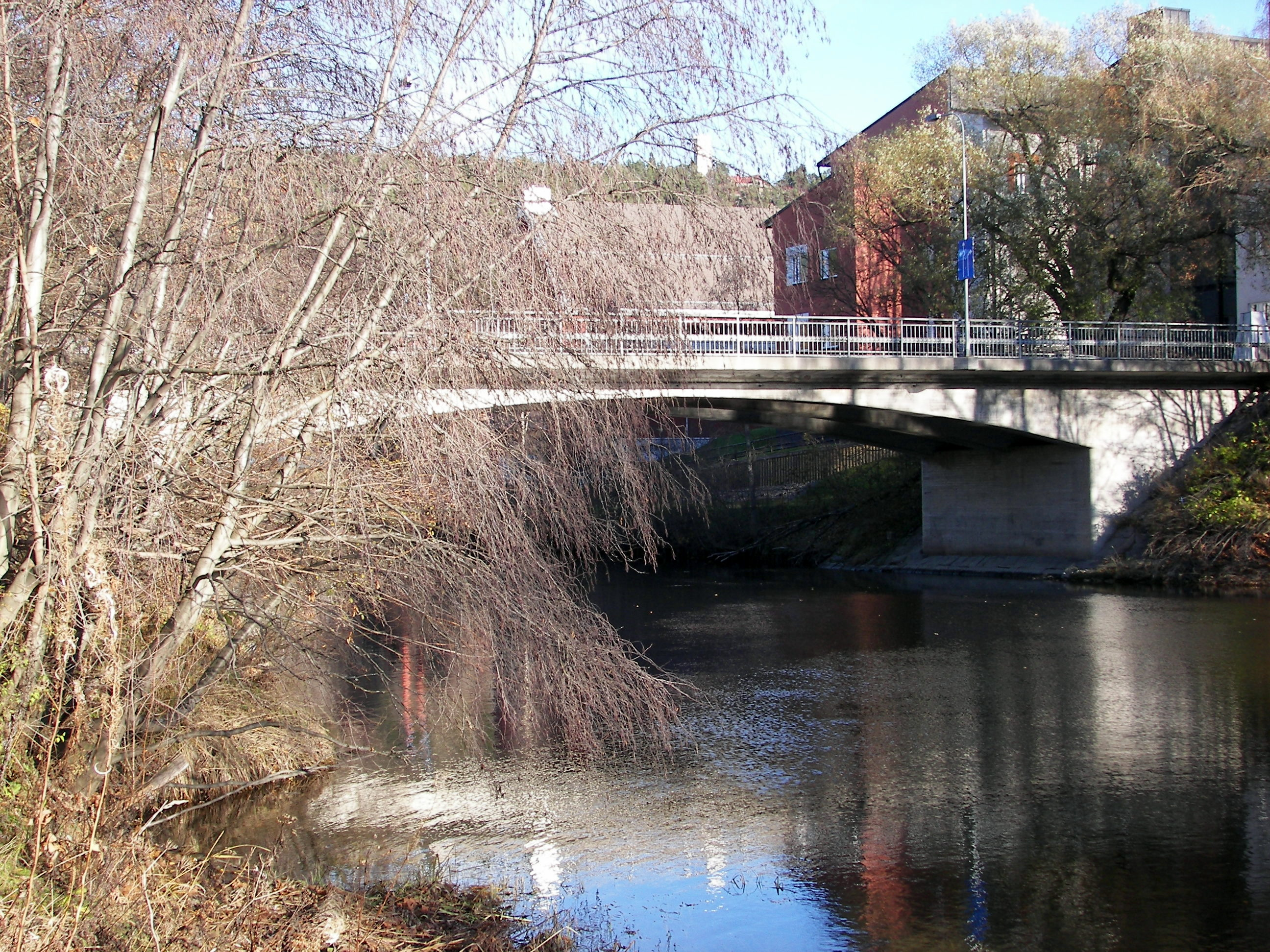 Widesbron i Sundsvall.